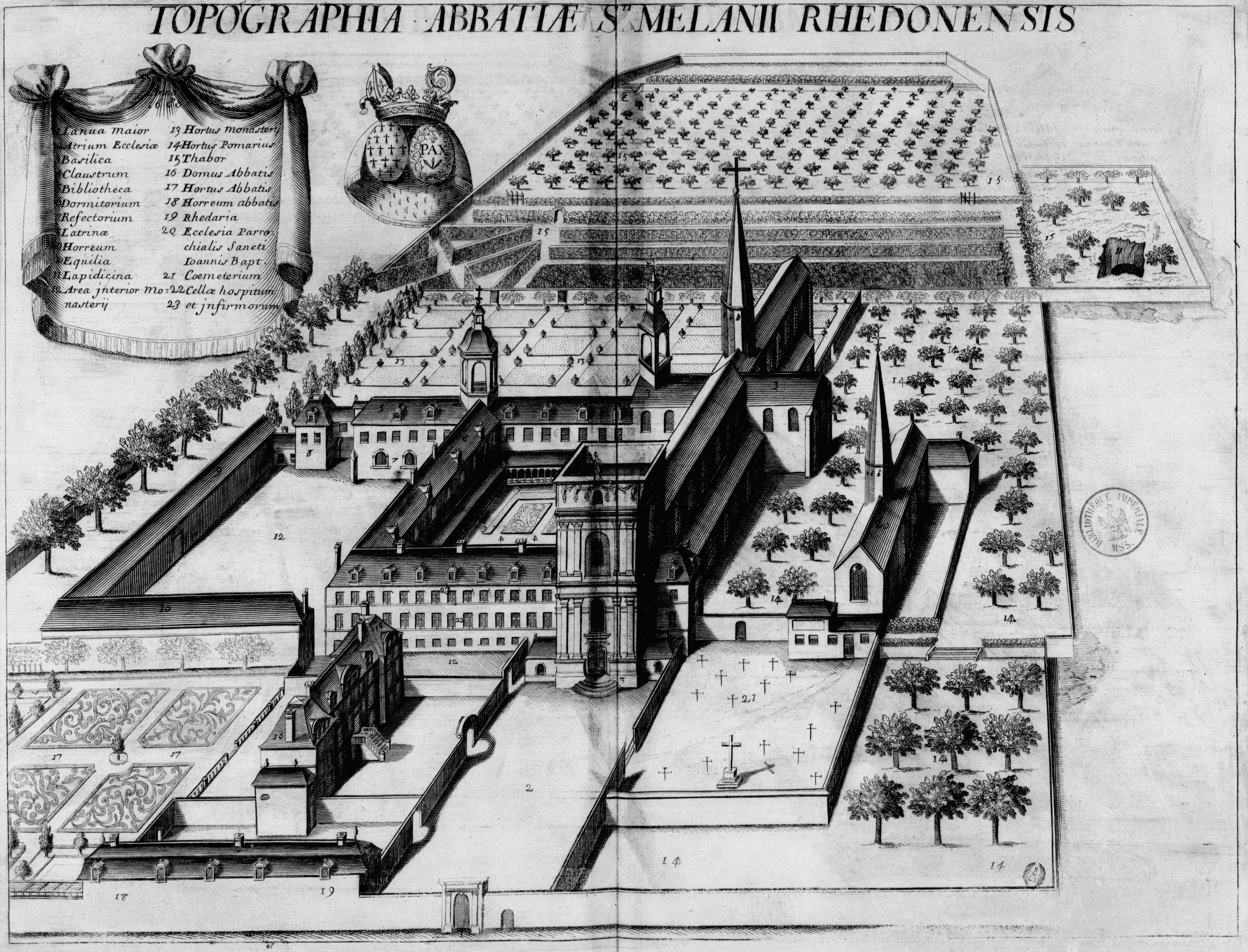 Planche gravée du 17ème siècle représentant l'abbaye Saint-Mélaine de Rennes, dans le livre Monasticon Gallicanum.